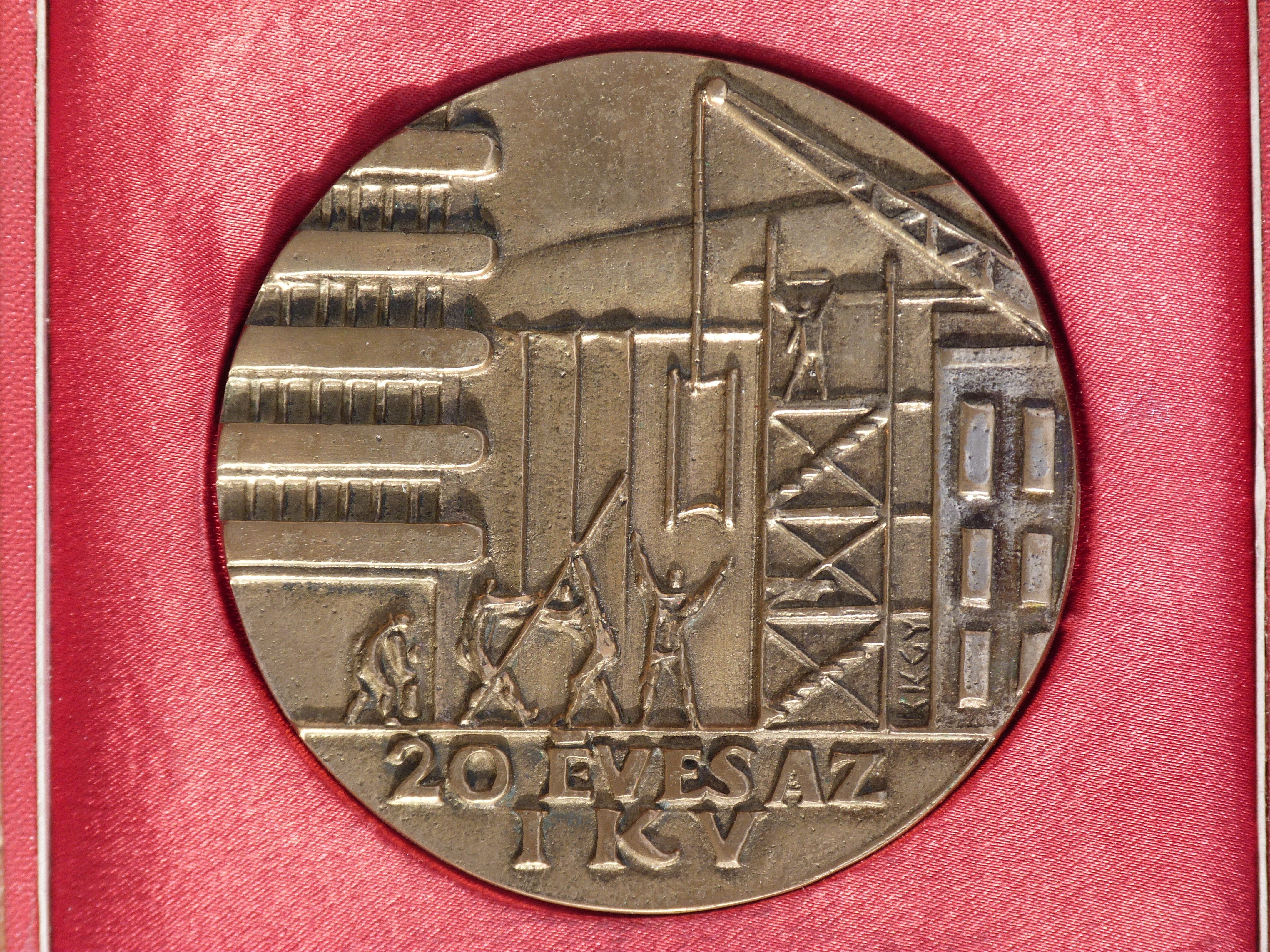 Emlékérem. Az Ingatlanközvetítő Vállalat 20 éves évfordulójára adták ki. " 20 éves az IKV". A fénykép készítésének időpontja: 2012. szeptember 27 -e.©© Megjelent Creative Commons alatt a Metapolisz sorozatban. A Metapolisz sorozat valamennyi képe és filmje Creative Commons alatti valamint kereskedelmi - for profit - célra is felhasználható. Ajánlott hivatkozás: Derzsi Elekes Andor: Metapolisz DVD line ©© Published under Creative Commons in the Metapolisz DVD line. All of the photos and vids in the Metapolisz DVD line are under Creative Commons and can be used even for commercial – for profit – purposes. Recommended Citation Derzsi Elekes Andor: Metapolisz DVD line